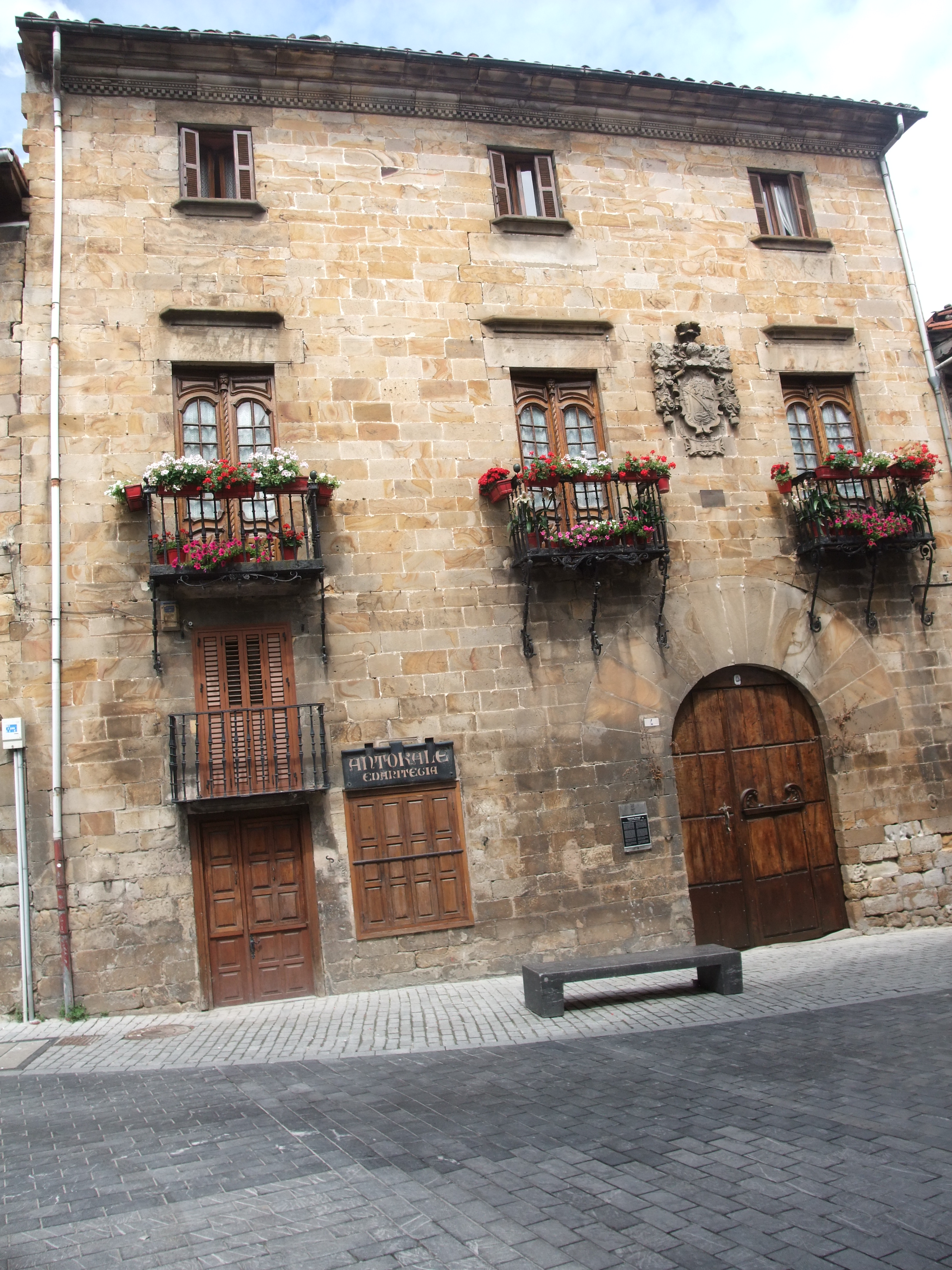 Segura (Guipúzcoa)-Palacio Balenzegi-1